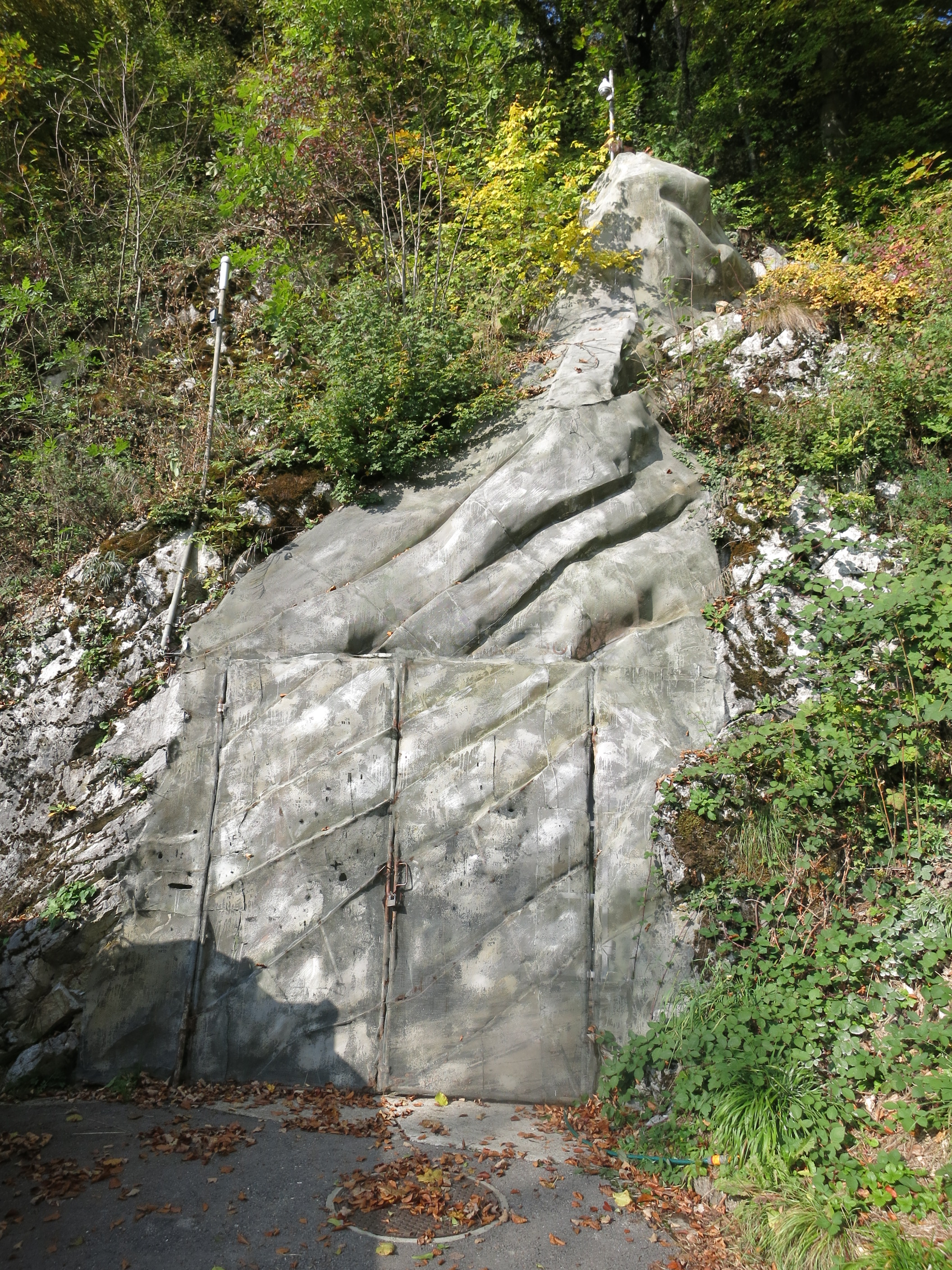 Artilleriewerk Champillon, Corbeyrier VD, Schweiz